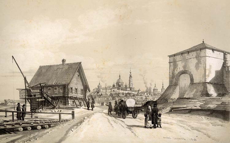 Въезд в крепость со стороны мельницы. Литография из альбома Андре Дюрана.